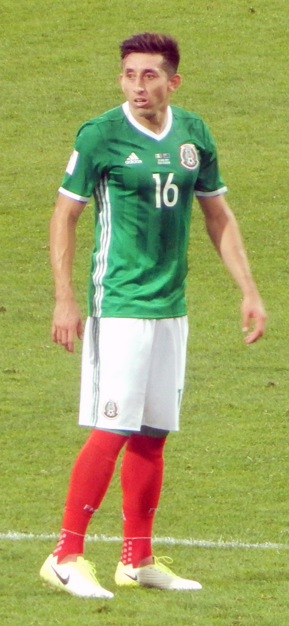 Эктор Эррера в матче против сборной Новой Зеландии